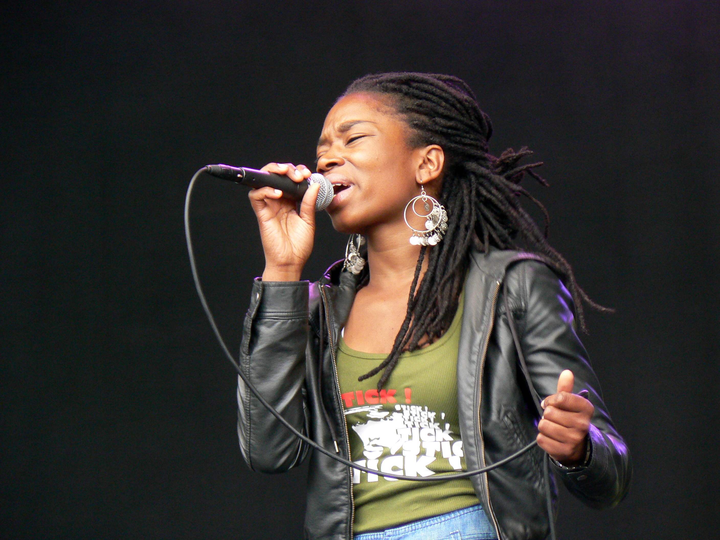 Festival Mundial in Tilburg op 20 juni 2009